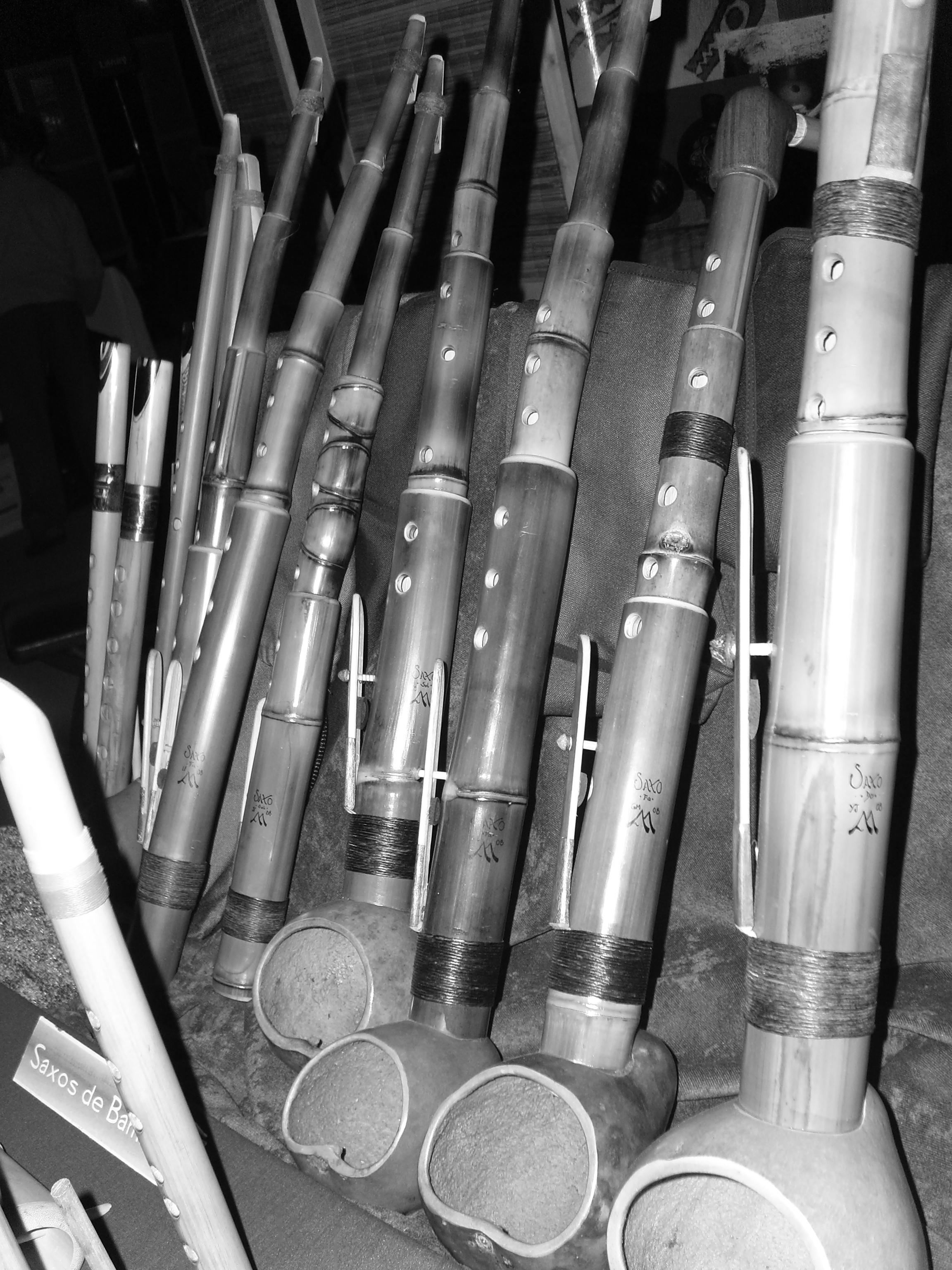 Saxos hechos de bambú por Angel Sampedro, luthier argentino... suenan una maravilla.